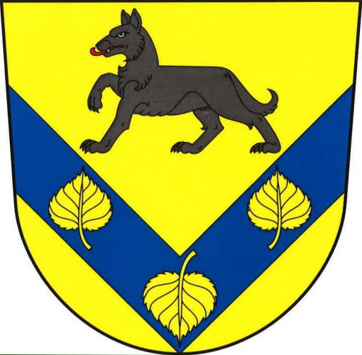 znak , Vlkov , okres Náchod